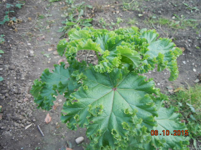 Slez kučeravý (Malva verticillata var. crispa L.)